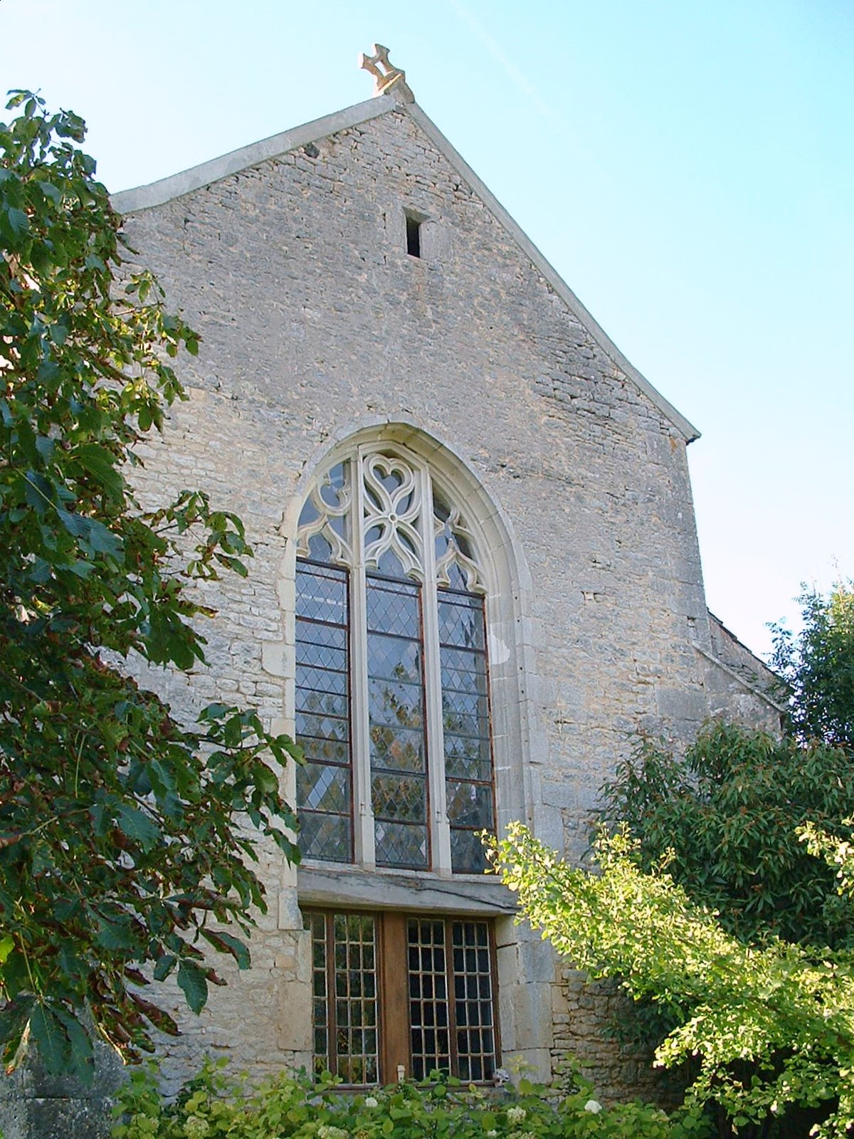 Châtel-Gérard (Yonne): Prieuré de Vausse, chevet de l'église